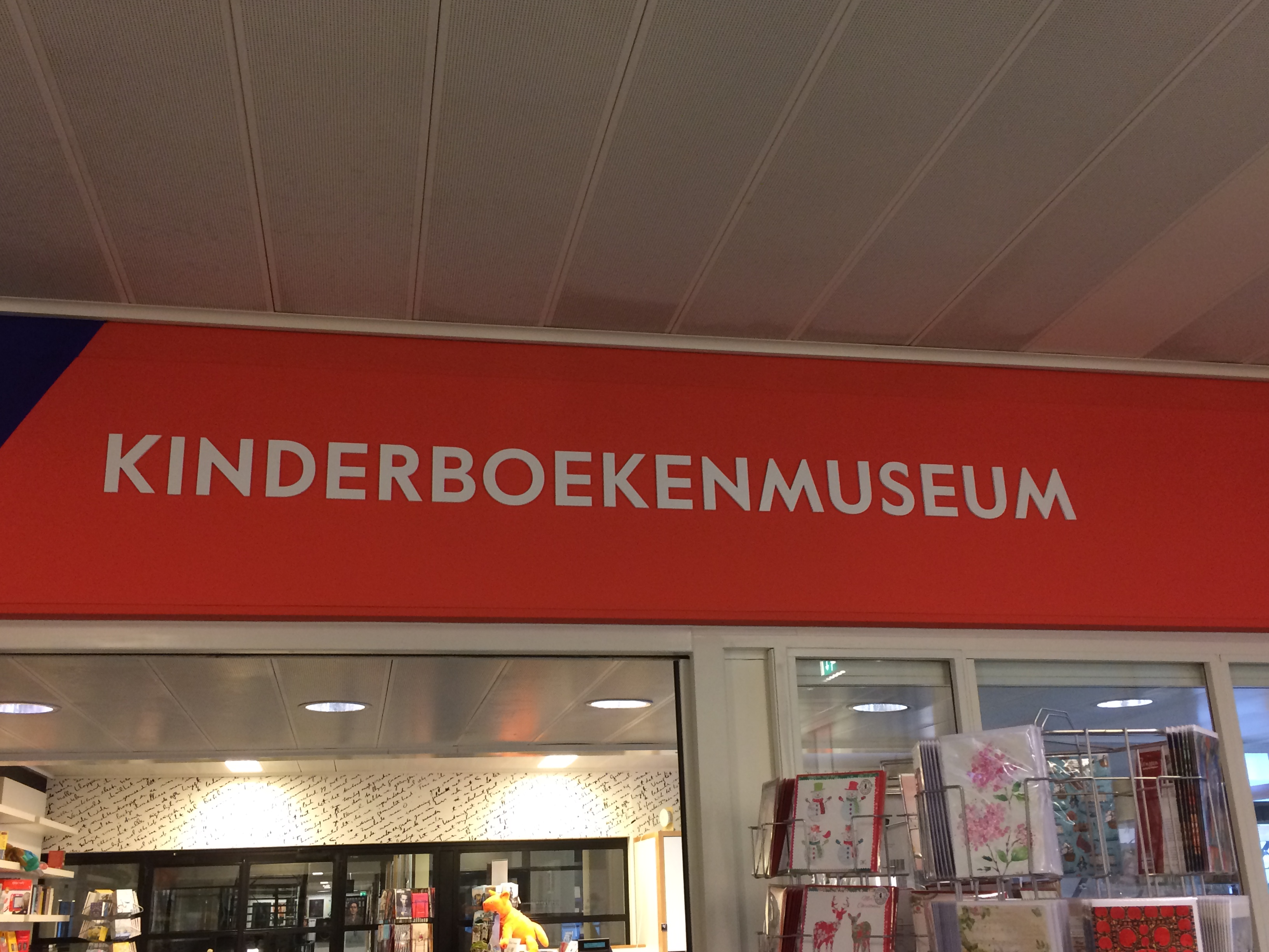 Entree Kinderboekenmuseum Den Haag